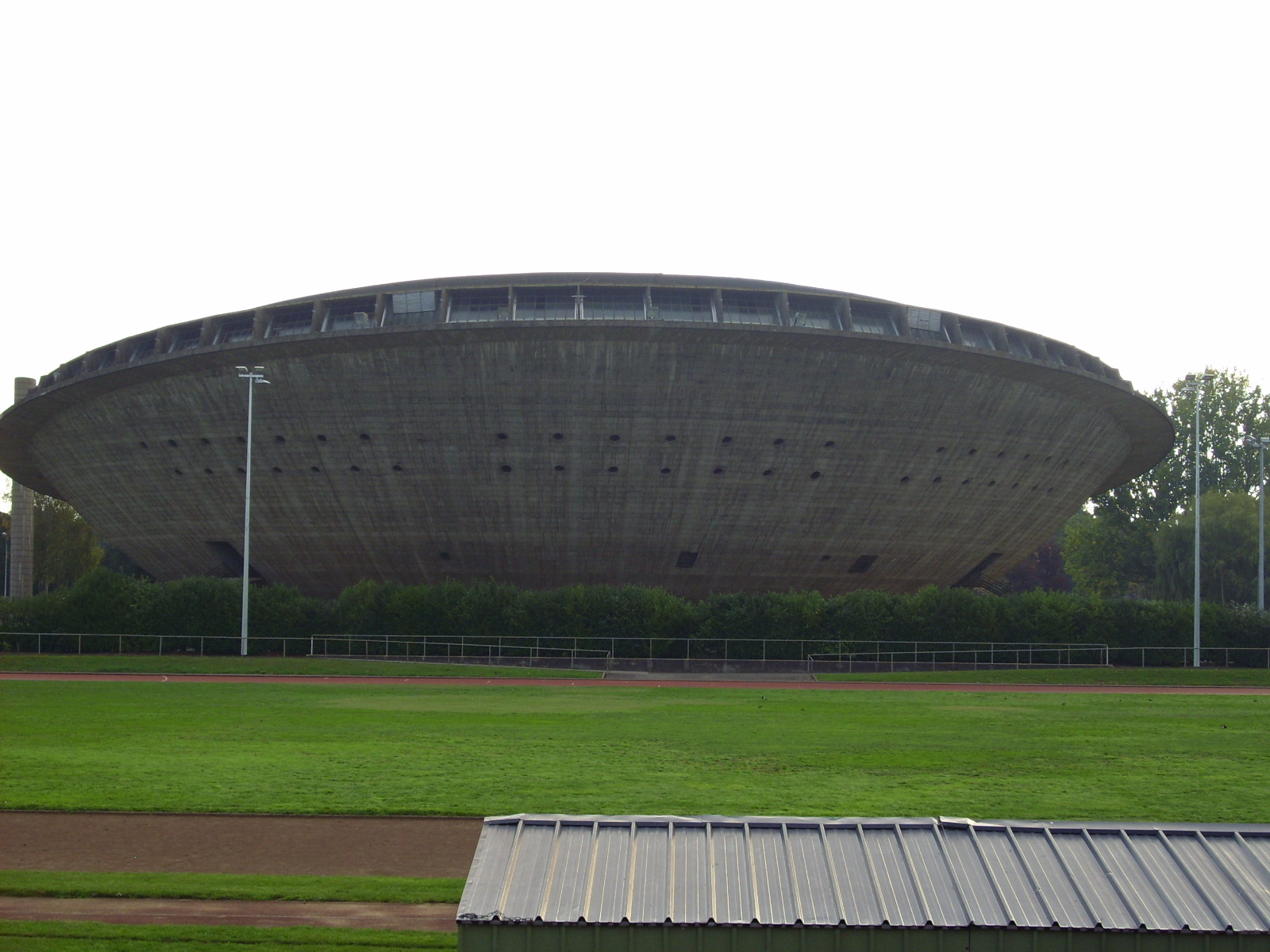 Salle omnisports de ST NAZAIRE